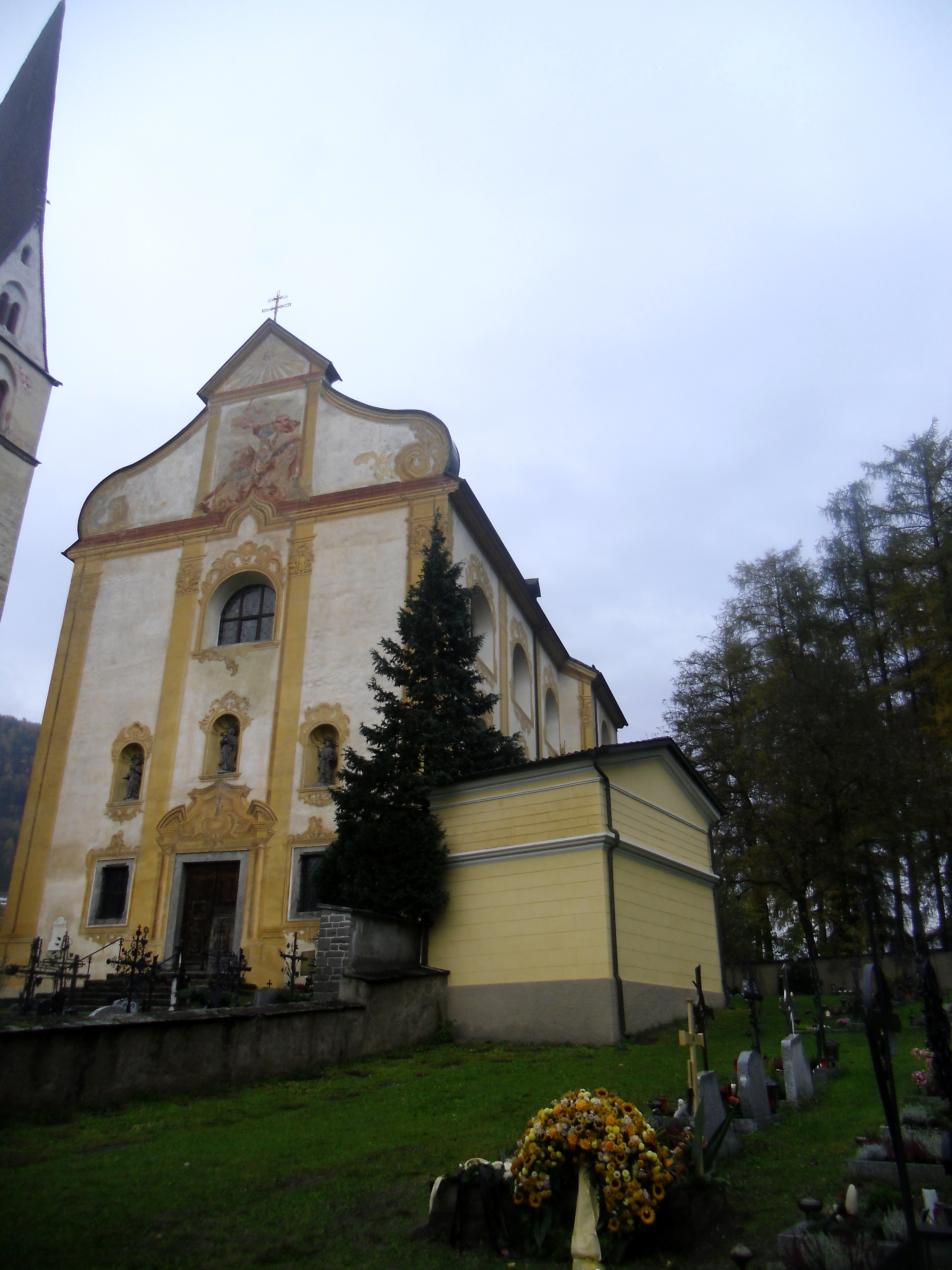 Pfarrkirche Maria Verkündigung in Niedervintl (Südtirol)